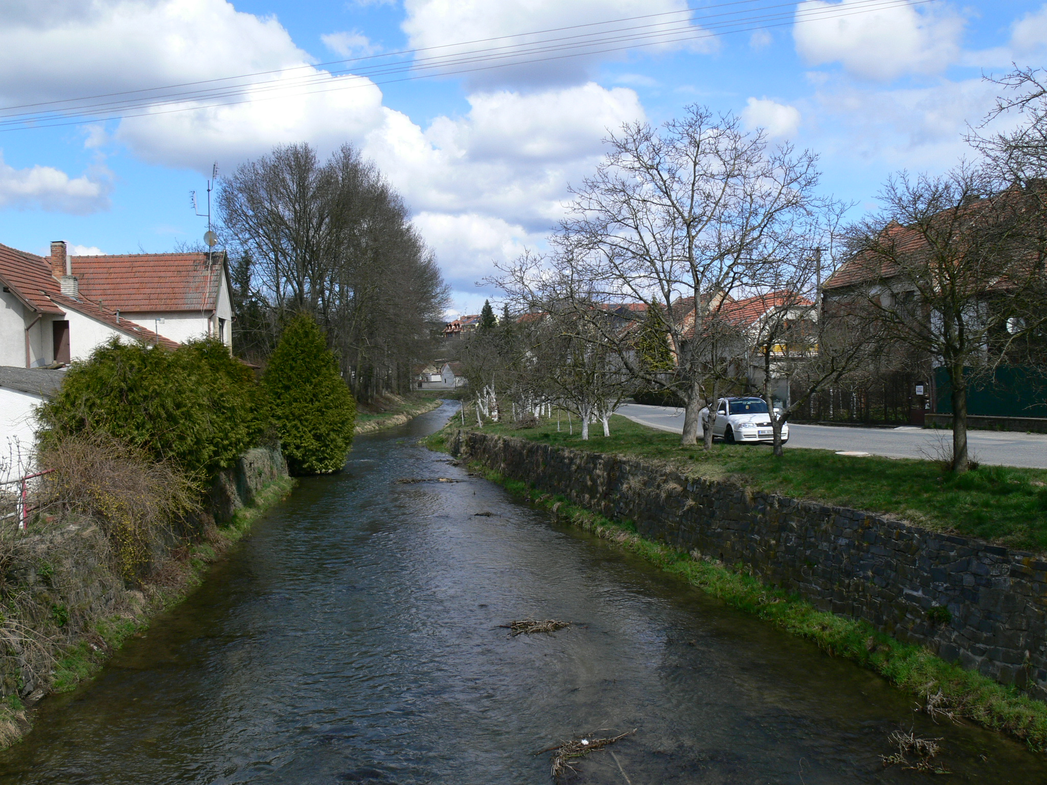 Dědice, Závodí, řeka Haná